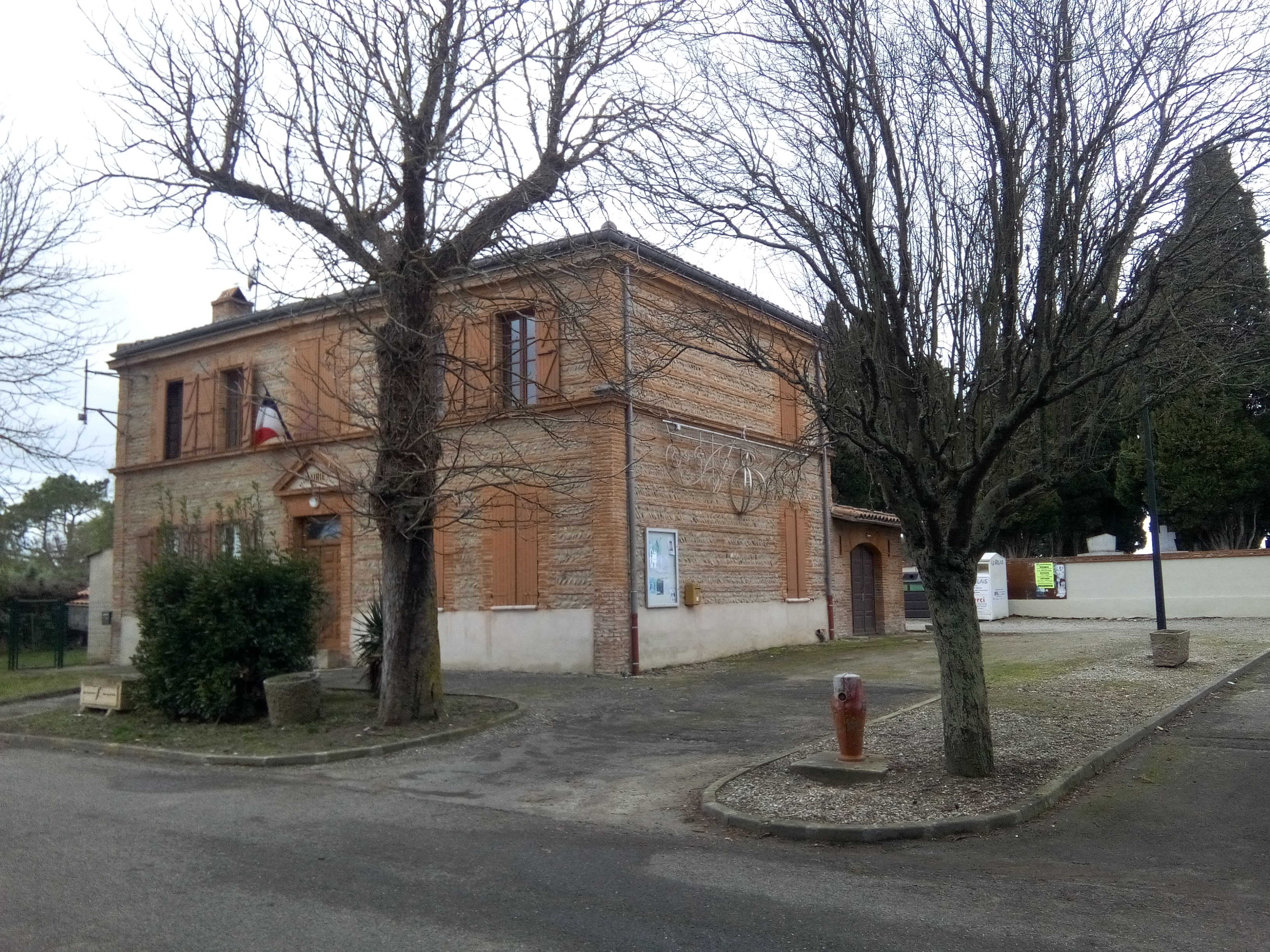 Mairie d'Auribail